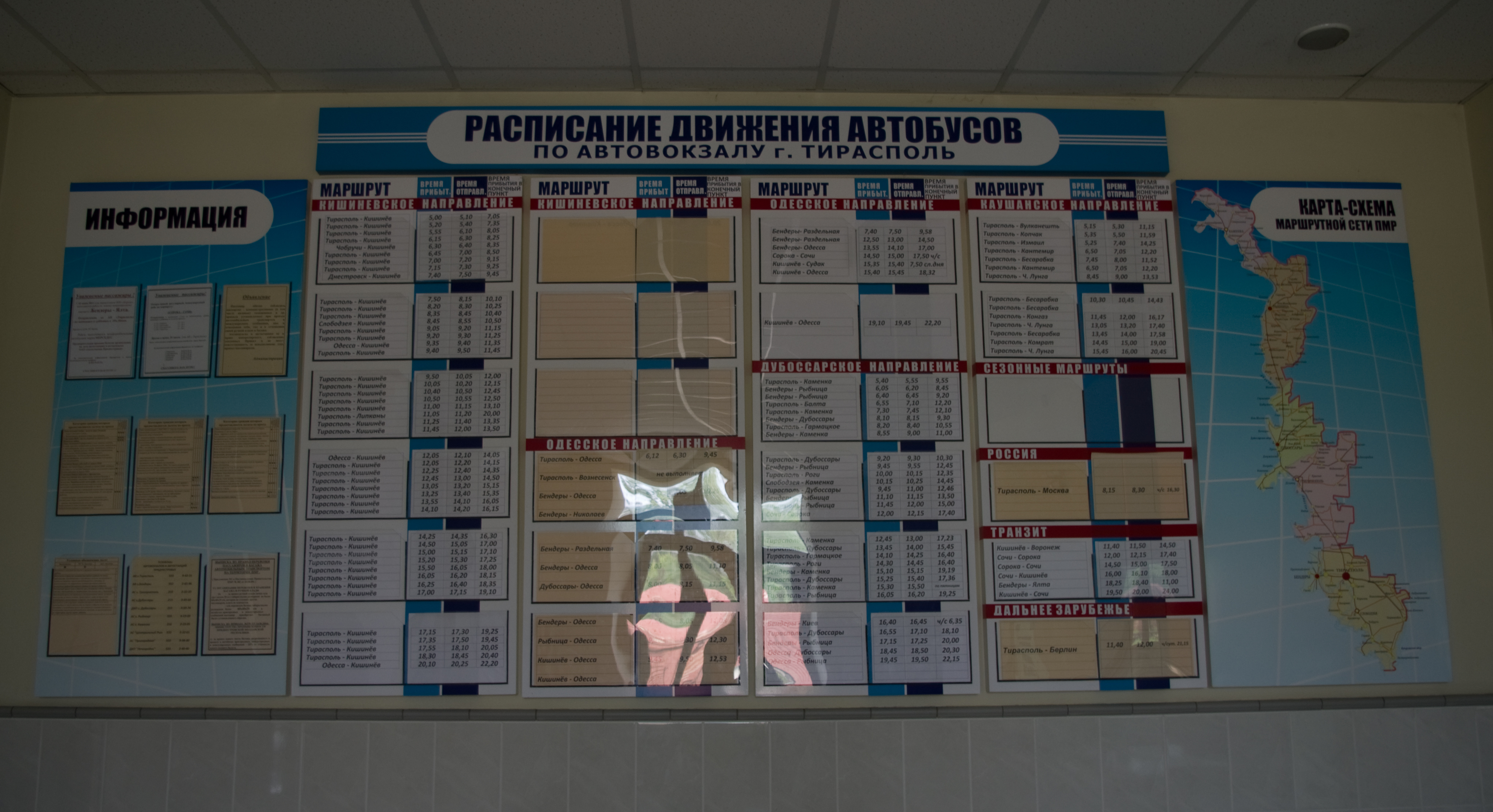 Расписание движения автобусов по автовокзалу г.Тирасполь в 2011 году